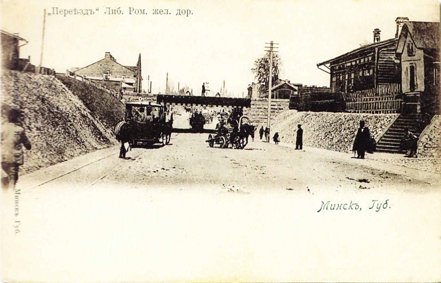 Беларуская (тарашкевіца): Менск (Miensk), Уборак (Uborki), вуліца Новазахараўская (vulica Novazacharaŭskaja). Чыгуначны мост